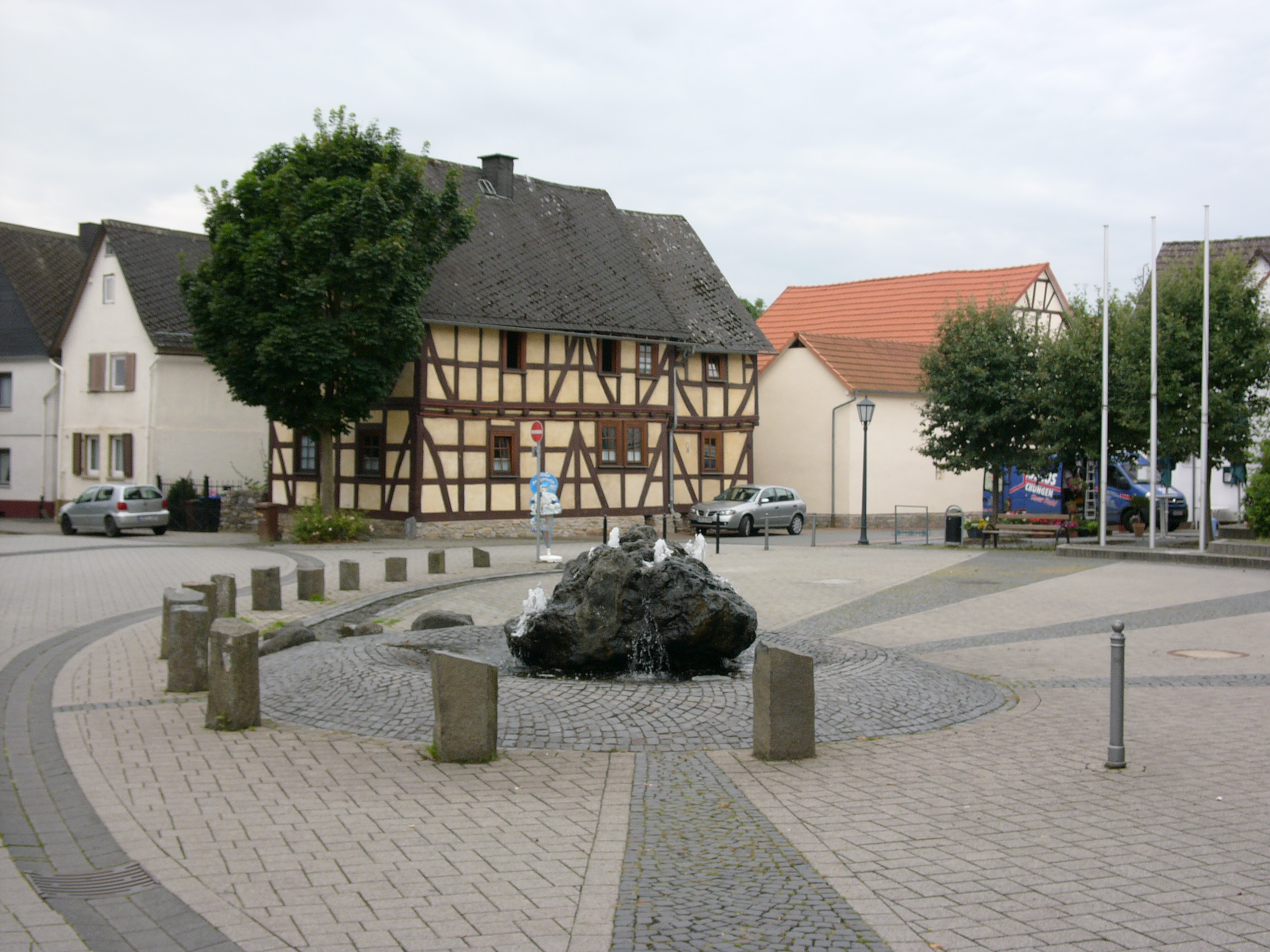 Dorfplatz in Aßlar-Werdorf (Lahn-Dill-Kreis) mit Brunnen und Fachwerkhaus